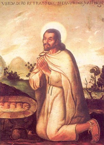 Painting of Juan Diego